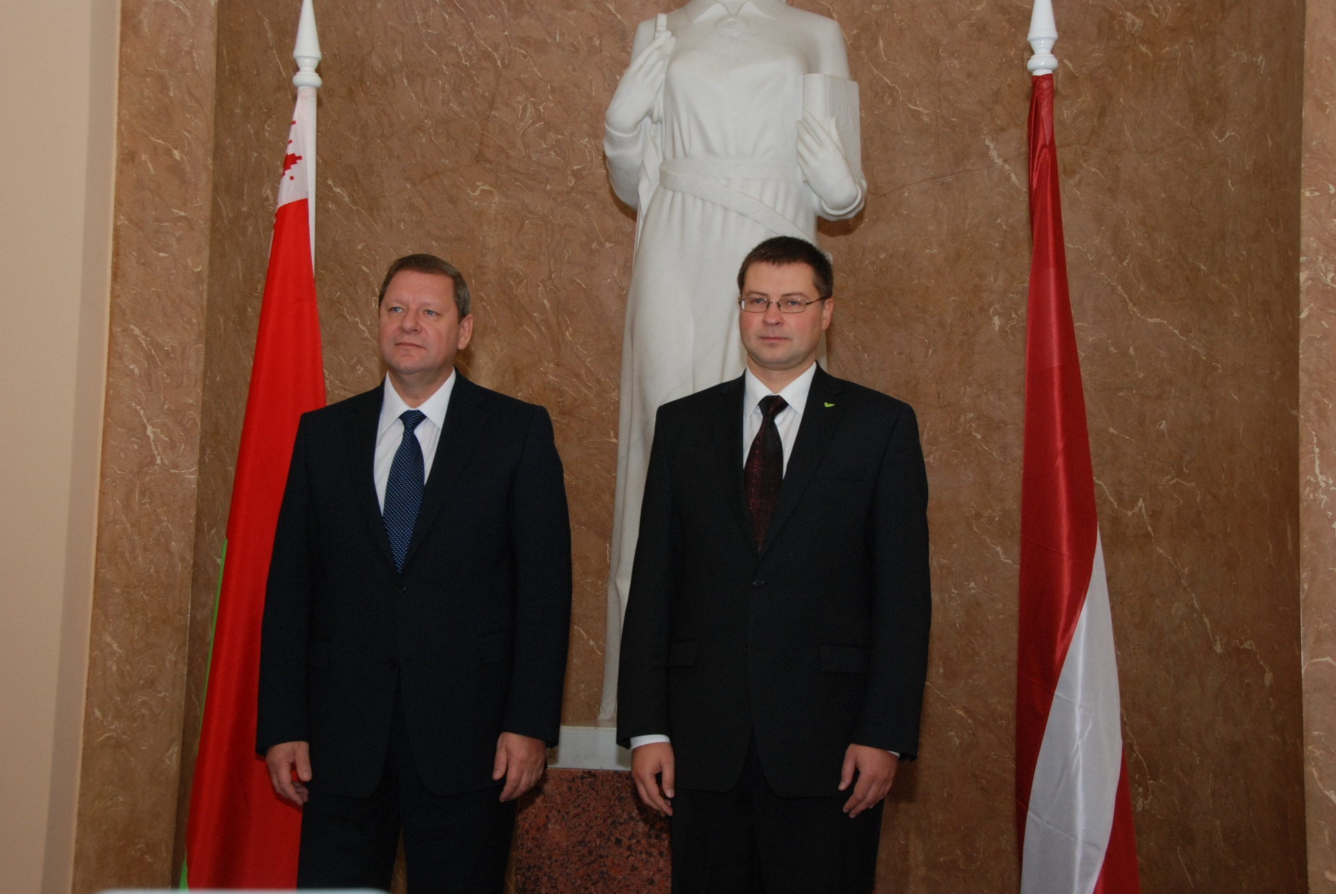 Ministru prezidenta Valda Dombrovska un Baltkrievijas premjerministra divpusējā tikšanās Foto: Aivis Freidenfelds, Valsts kanceleja